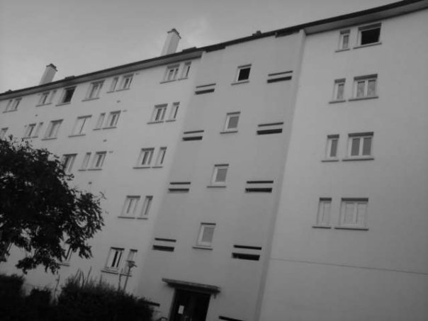 Mail noir et blanc